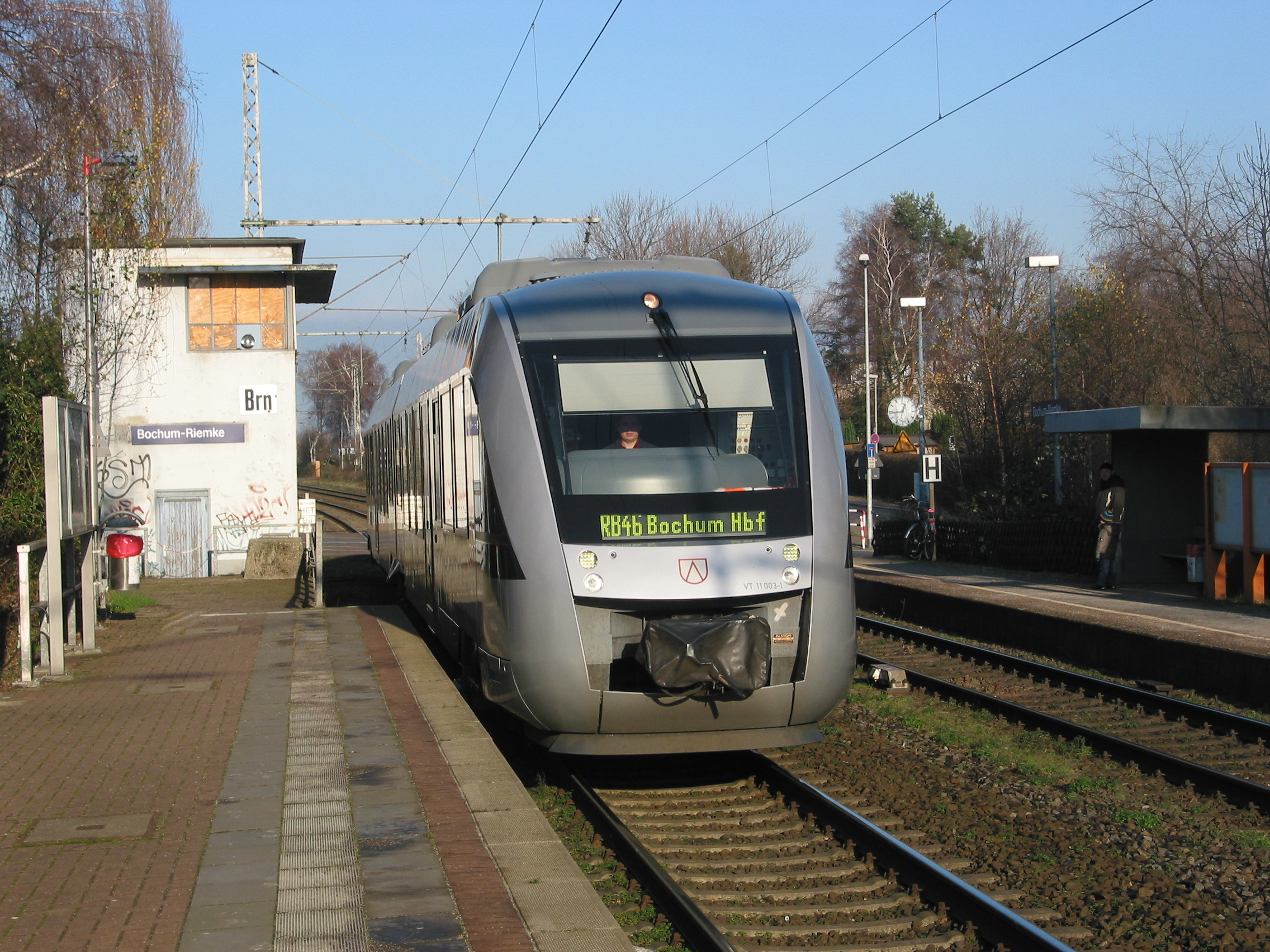 Die Glückauf-Bahn (VT 11 003 = 648 330-9 und 648 830-8) in Bochum-Riemke